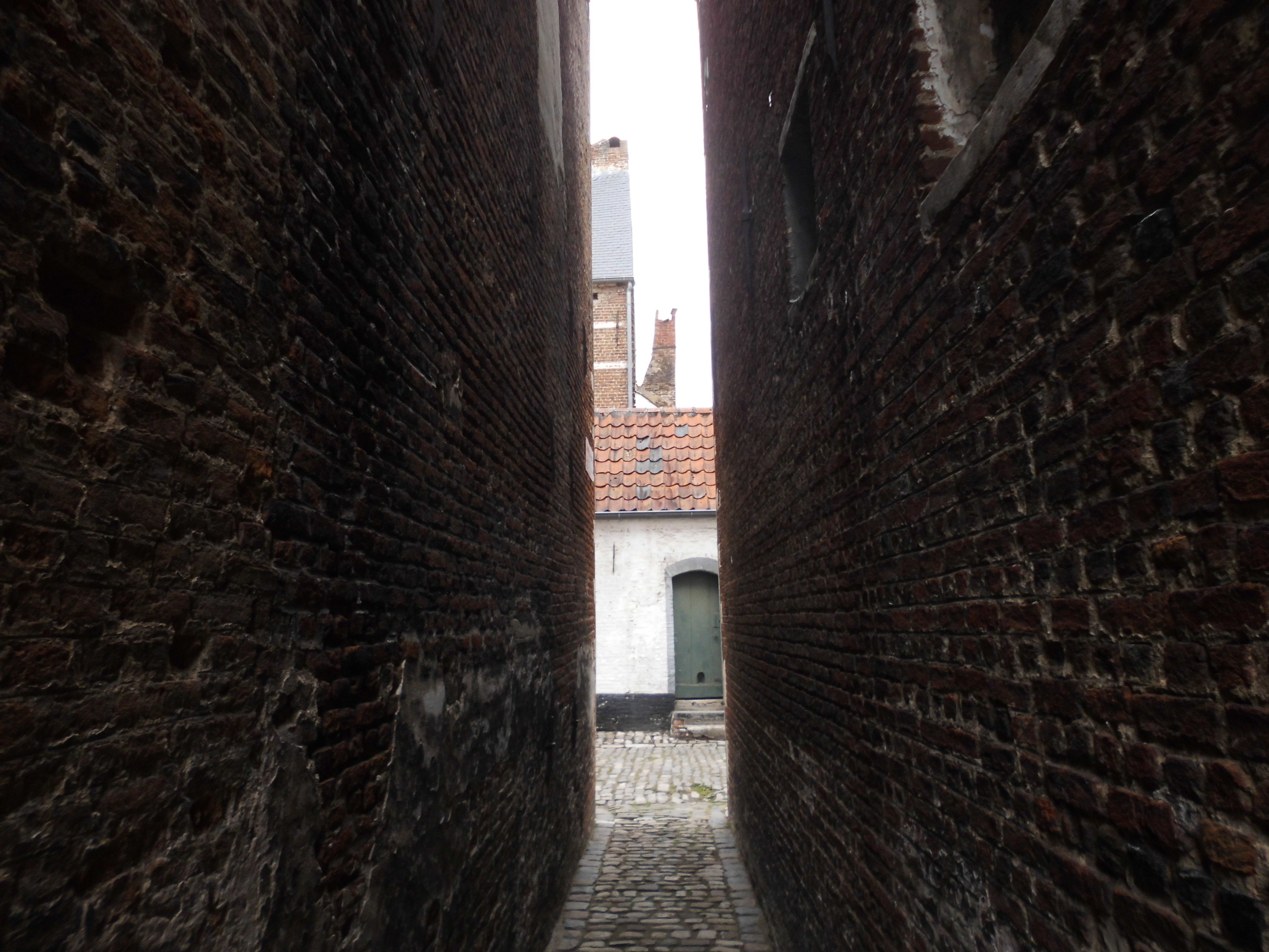 Hemdsmouwken in Lier. Smalste straat in Lier. Was vroeger een brandstraatje.